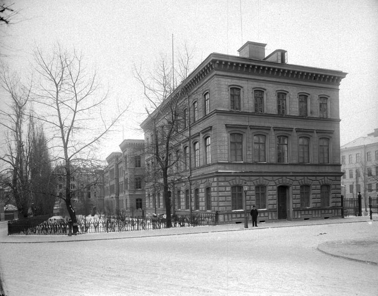 Teknologiska institutets (nuvarande Kungliga tekniska högskolan) forna byggnad på Drottninggatan 95 i Stockholm. Byggnaden finns kvar och rymmer idag Kungliga Skogs- och Lantbruksakademien.